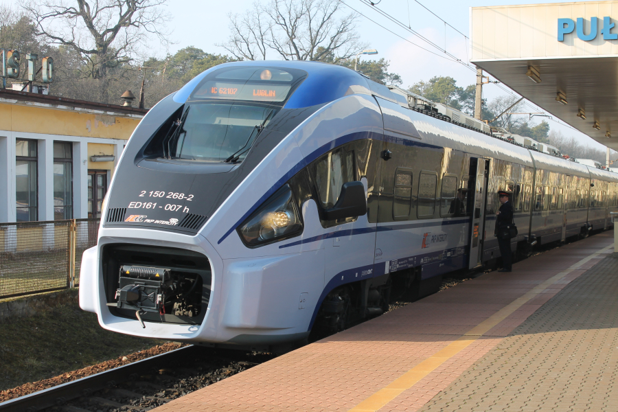 Elektryczny zespół trakcyjny Pesa Dart ED161-007 jako pociąg IC 62107 Konopnicka relacji Wrocław Główny – Lublin stoi na przystanku osobowym Puławy Miasto.